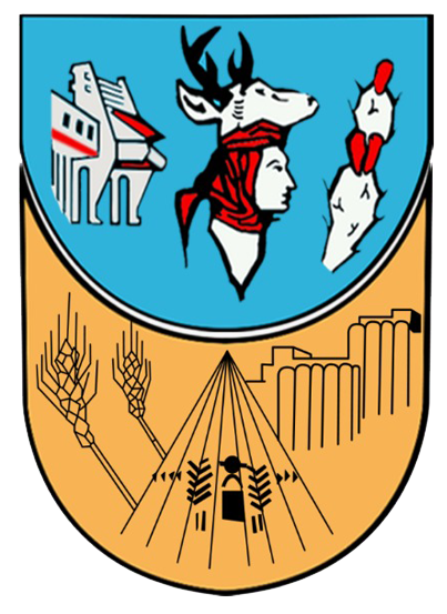 Escudo del municipio sonorense.